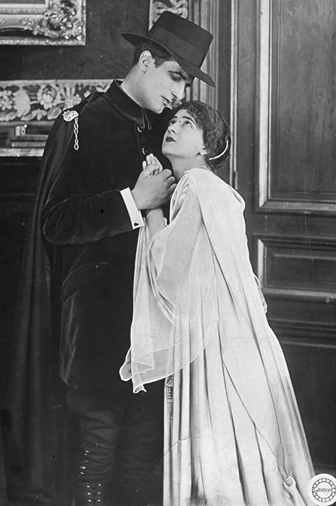 René Cresté et Yvette Andréyor - La nouvelle mission de Judex, épisode 1. Le mystère d'une nuit d'été.